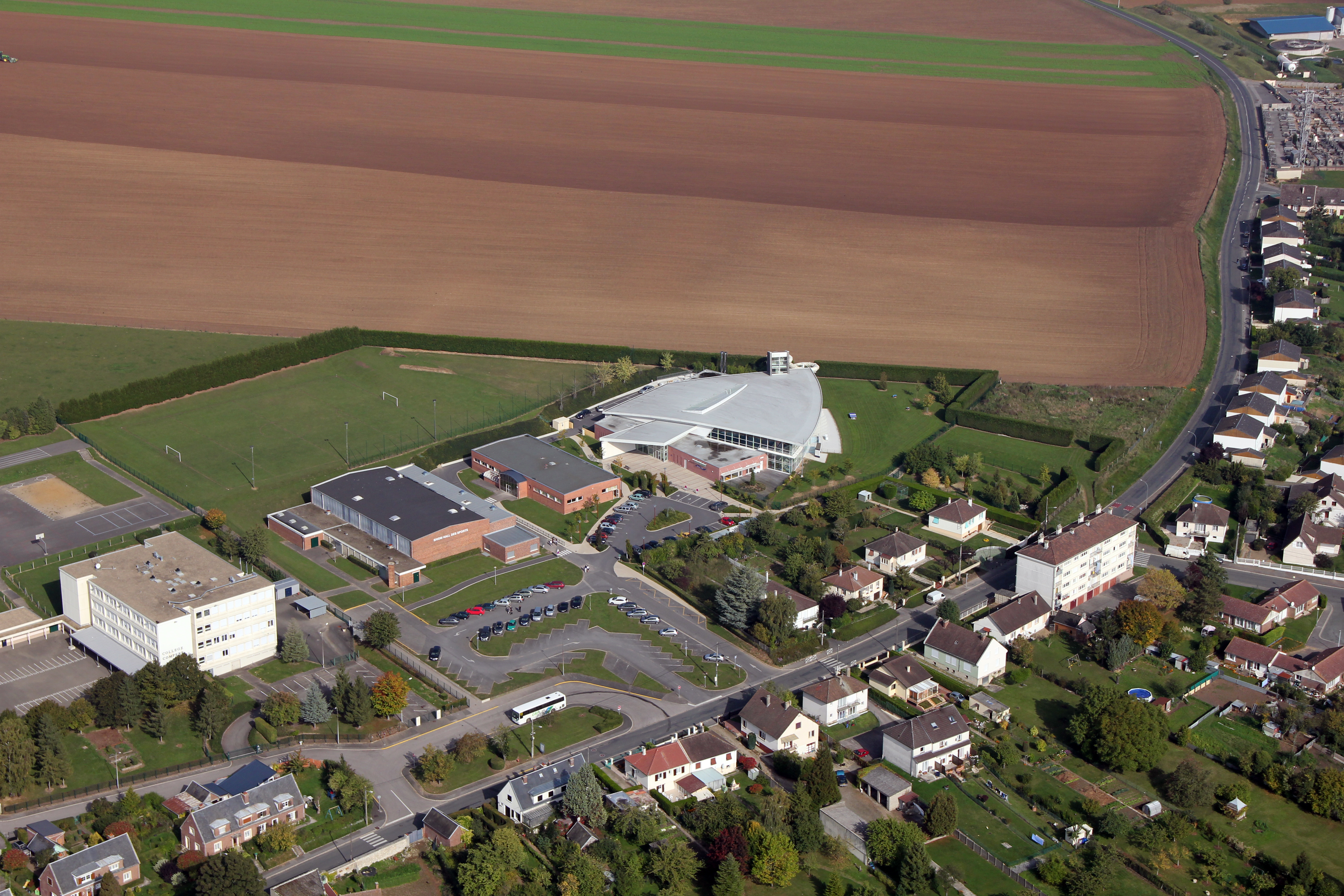 Centre aquatique Philippe Loisel, Halle des sports de la communauté de communes des Vallées de la Brèche et de la Noye (CCVBN) et collège Compère Morel à Breteuil (Oise, France).